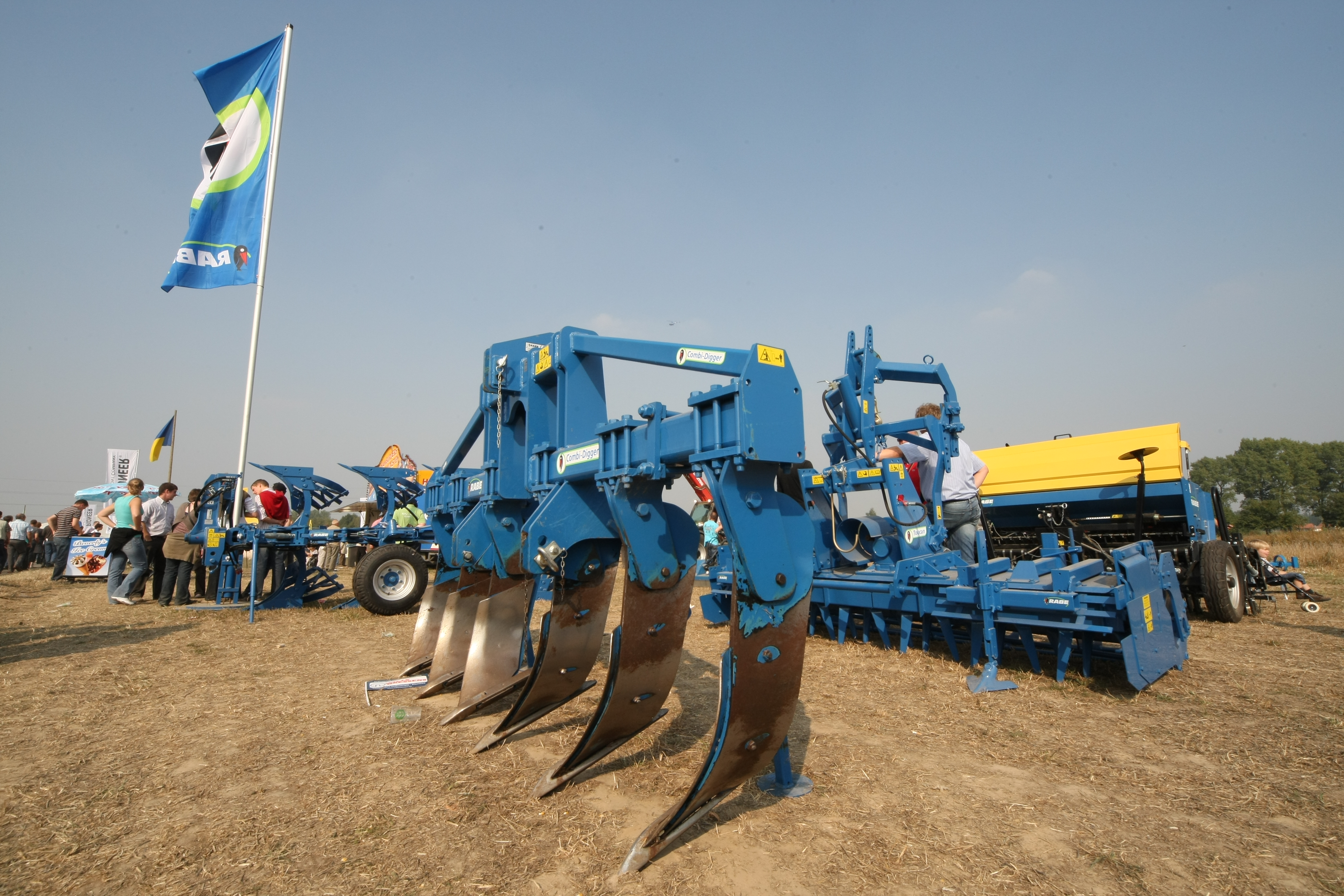 Gerätepräsentation von Rabe Agri bei den Werktuigendagen 2009 in Belgien: In der Bildmitte vorne ein Untergrundlockerer (Tiefenlockerer) Combi-Digger, dahinter rechts eine Kreiselegge Toucan, im Hintergrund links ein Anbaudrehpflug und rechts eine mechanische Sämaschine Ceria.